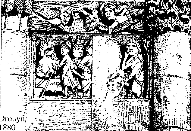 Dessin: Hérode et les Mages